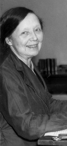 portrett, kvinne, psykolog, pedagog, professor, sittende halvfigur ved skrivebord.